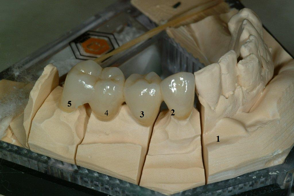 Brücke 43-46, 46 heimseziert